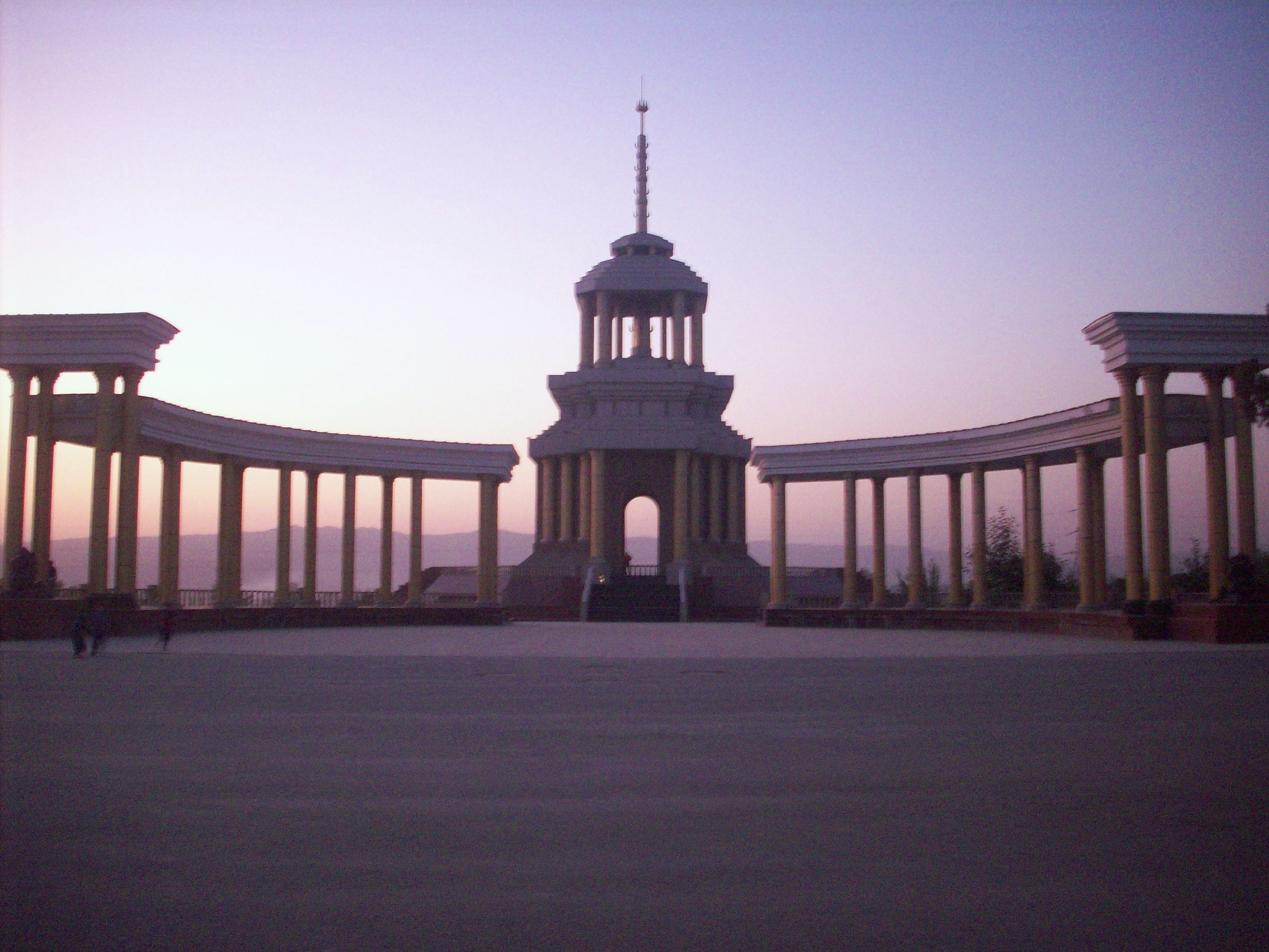 Kulob, Tajikistan